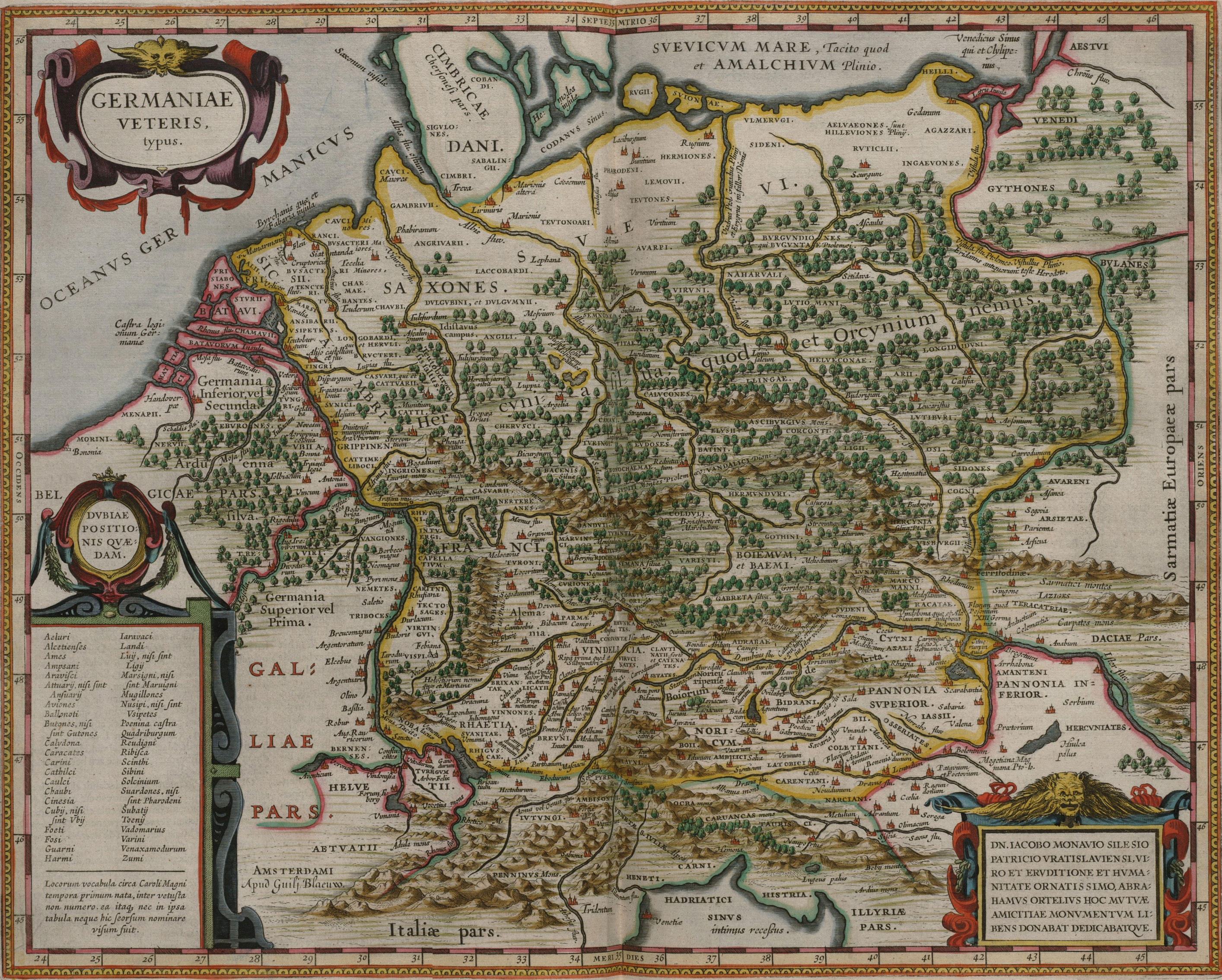 Данная карта взята из Большого атласа, который также именуют Космографией Блау (фр. Le Grand Atlas, ou Cosmographie Blaviane, en laquelle est exactement descritte la terre, la mer, et le ciel) — 12-томный атлас 1667 года, который воспроизводит картину изученного на тот момент мира и изданный голландским картографом Яном Блау.